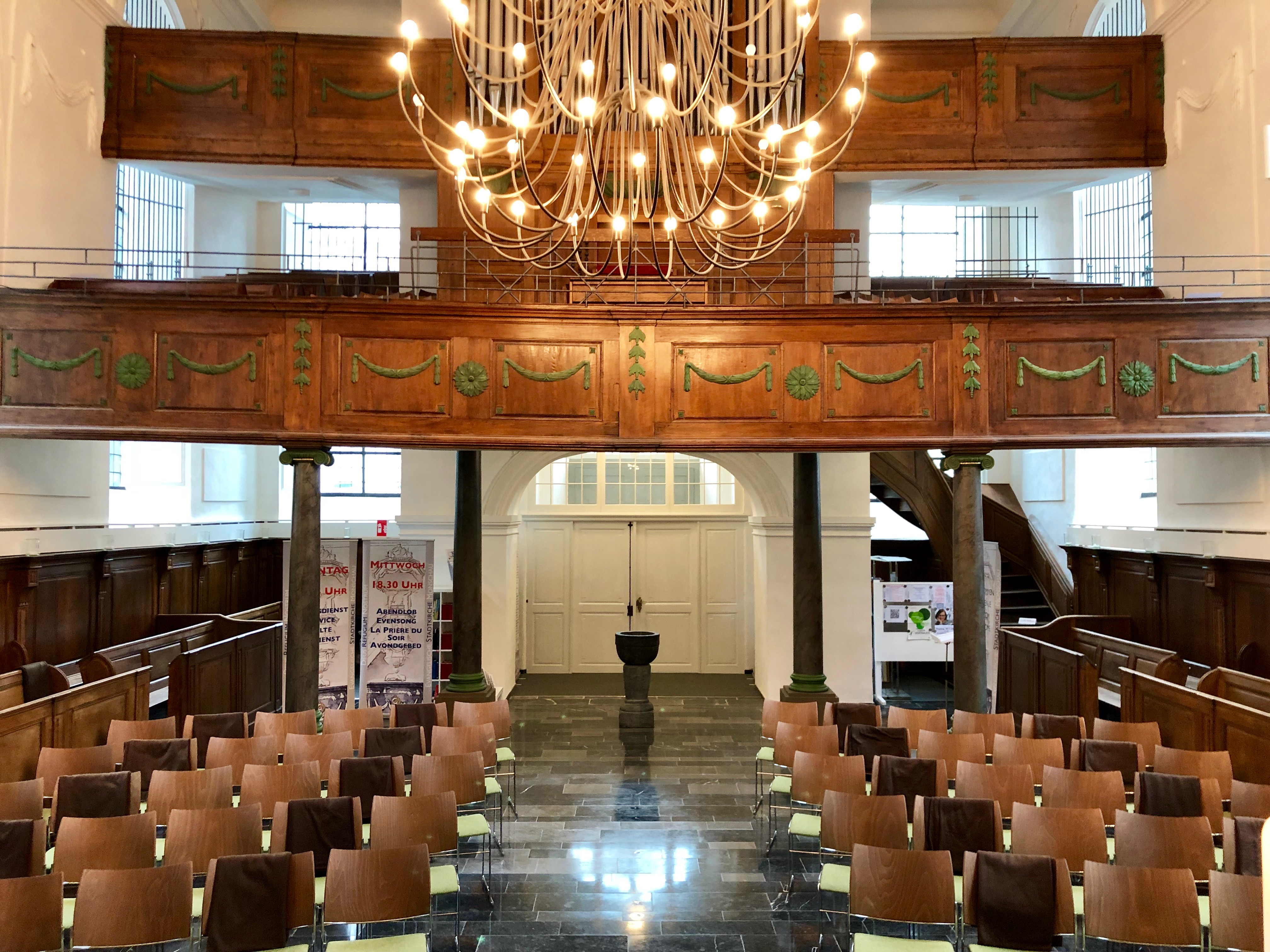 Kircheninnenraum mit Emporen, Zustand Januar 2019